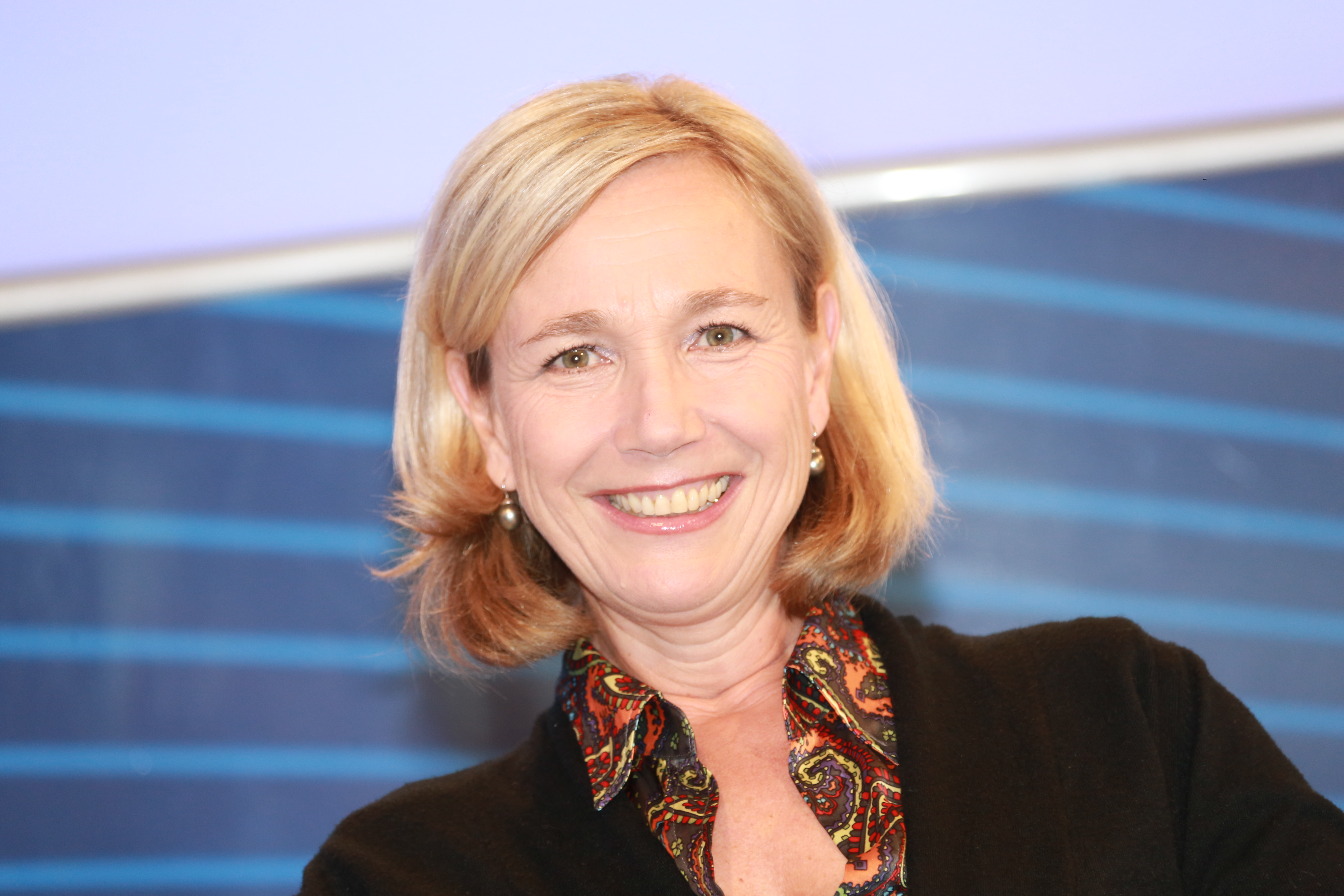 Amelie Fried